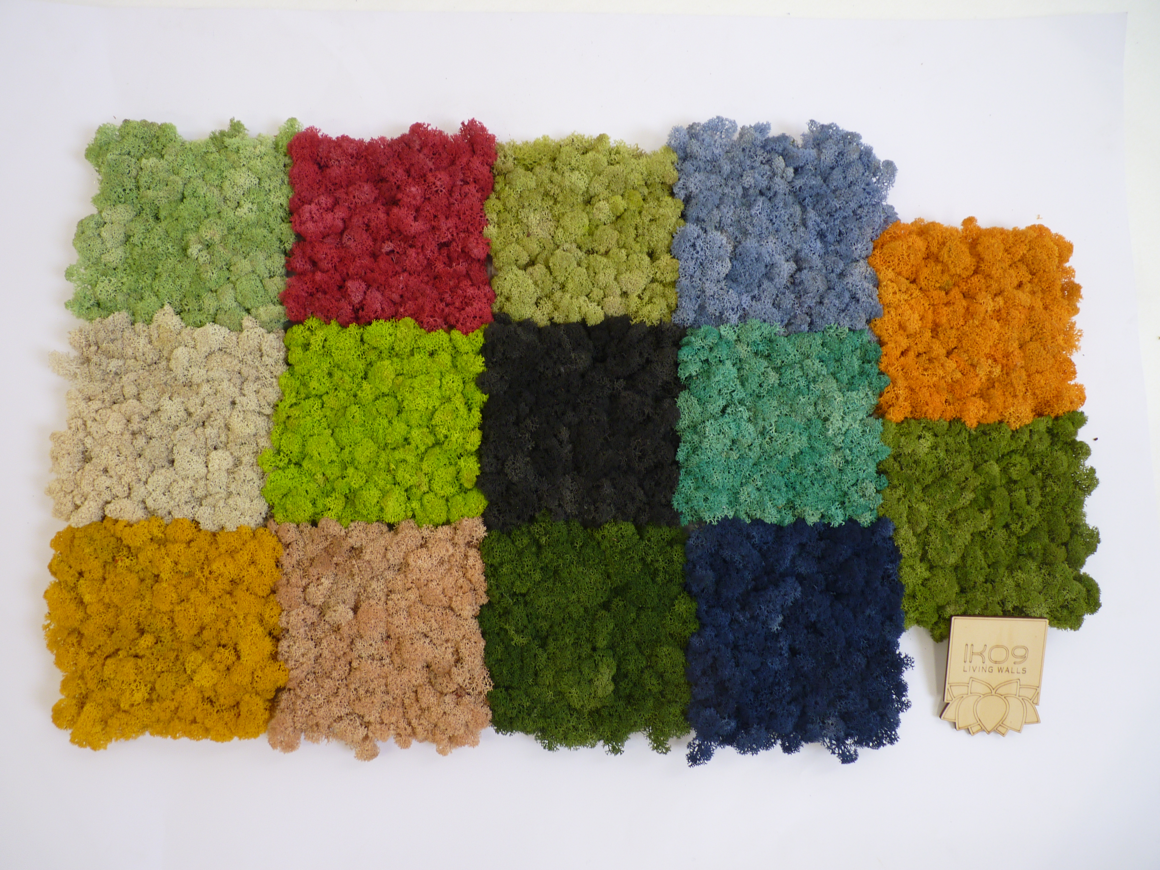 Veliko število barv, ki je na voljo pri dekorativnem mahu prepriča marsikoga, da bi tudi sam imel kakšno umetnino narejeno iz njega.